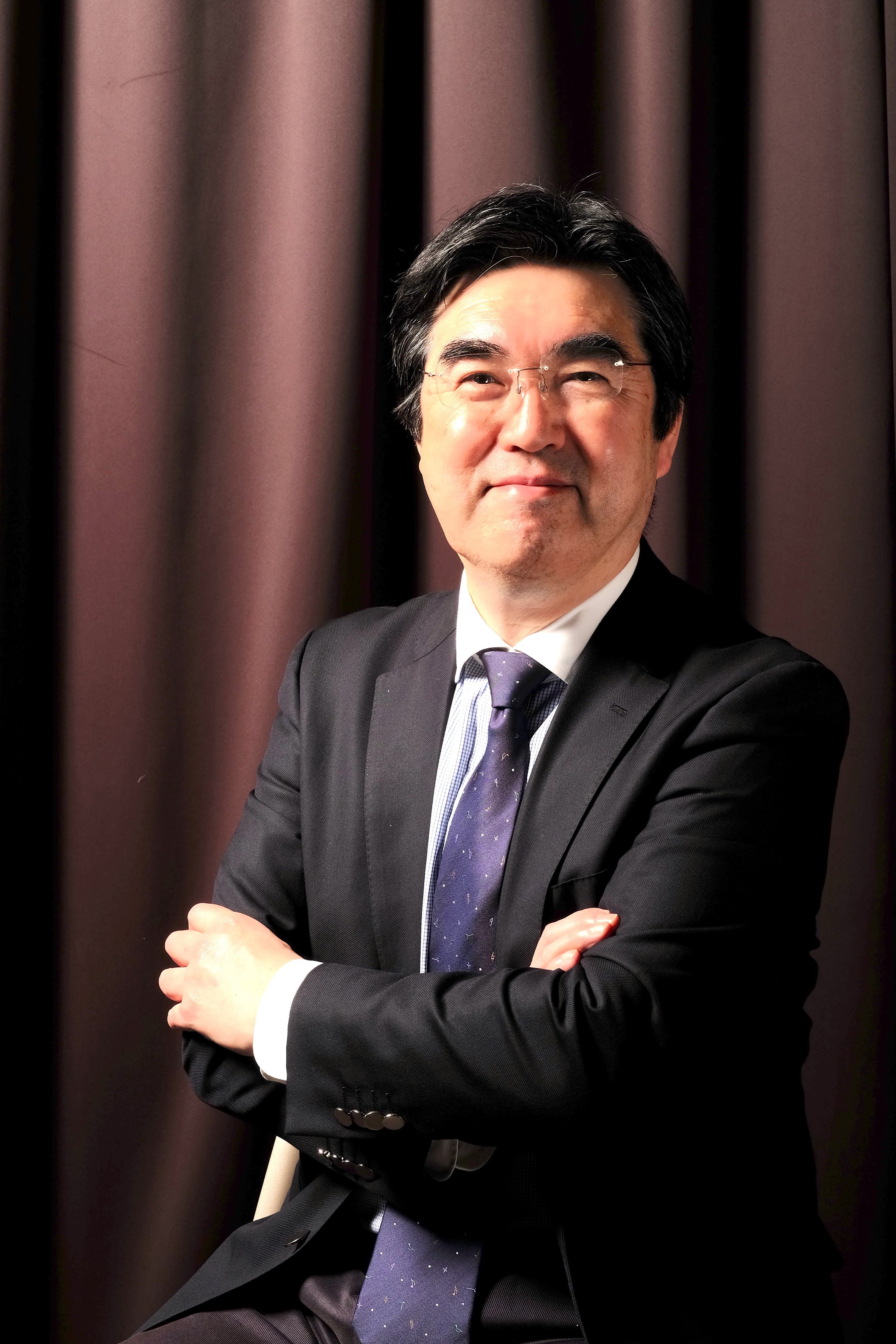 株式会社フロンティアーズ伊藤裕太